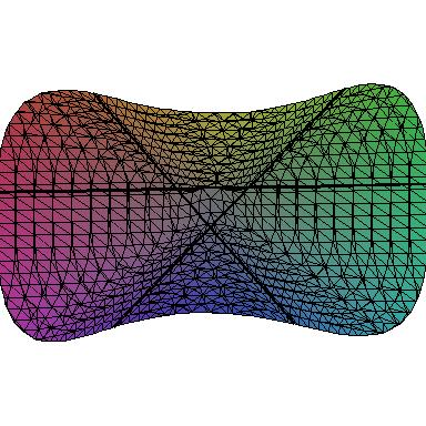 Surface de Fermat réelle avec trois droites